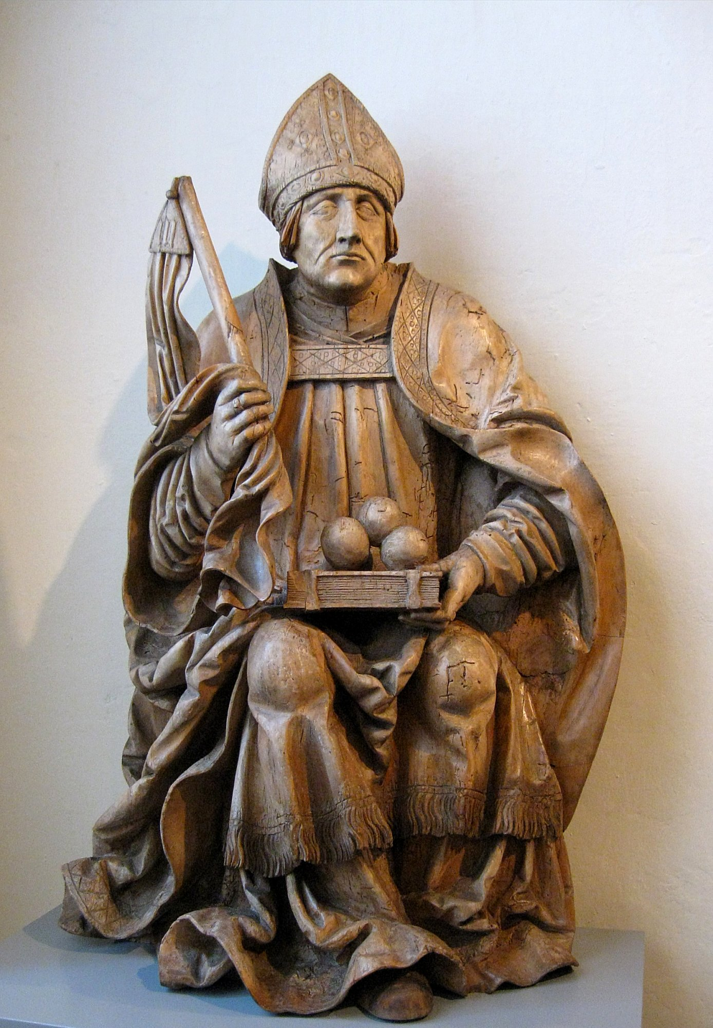 Meister der Altöttinger Türen: Hl. Nikolaus, um_1520-30, Laubholz, Fassung entfernt, Bayerisches Nationalmuseum in München